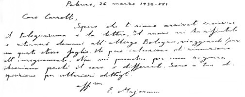 Ultima lettera: "Caro Carrelli [Antonio, n.d.r.], Spero ti siano arrivati insieme il telegramma e la lettera. Il mare mi ha rifiutato e ritornerò domani all'albergo Bologna, viaggiando forse con questo stesso foglio. Ho però intenzione di rinunziare all'insegnamento. Non mi prendere per una ragazza ibseniana perché il caso è differente. Sono a tua disposizione per ulteriori dettagli."